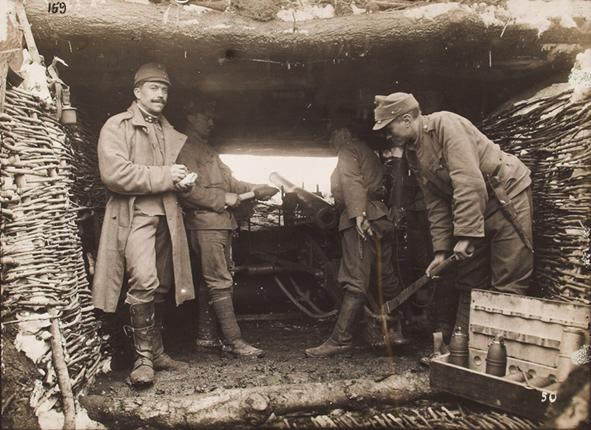 bitnica hrvatskog domobranstva u rovu, bojišnica na Soči